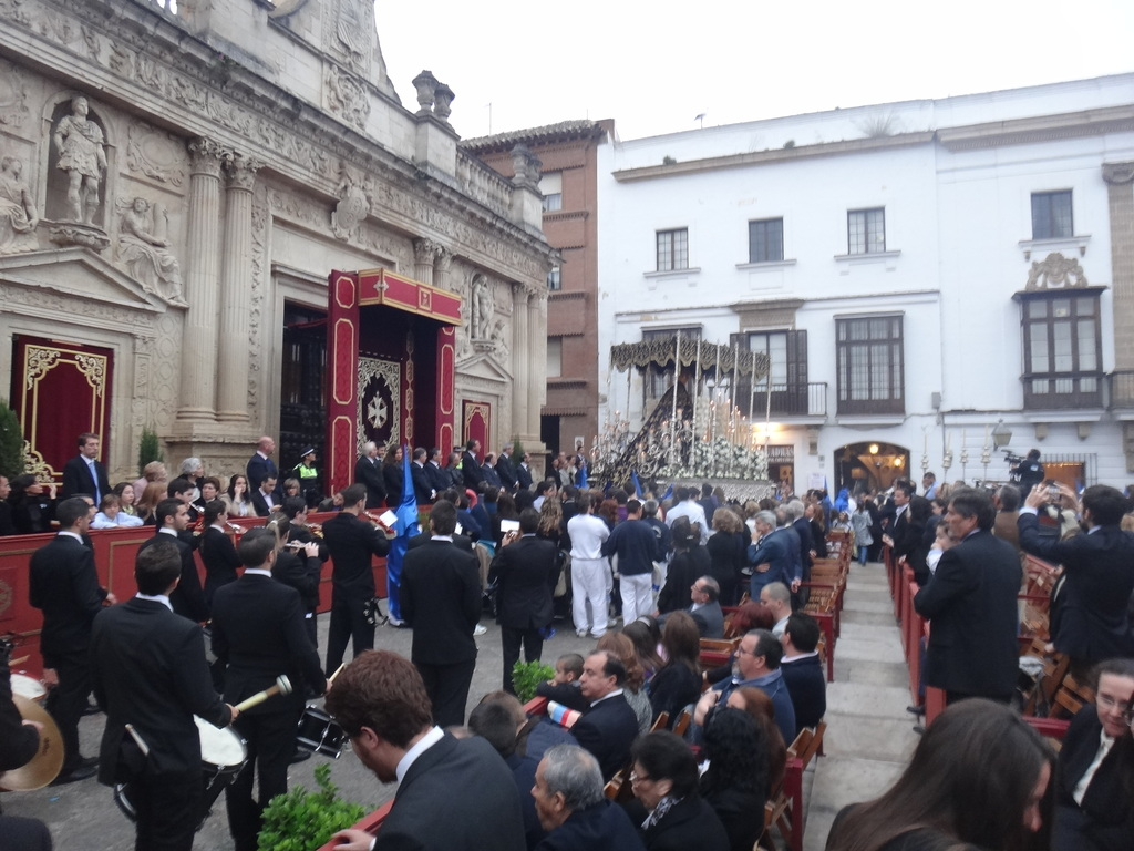 Semana Santa de Jerez (Andalucía, España)